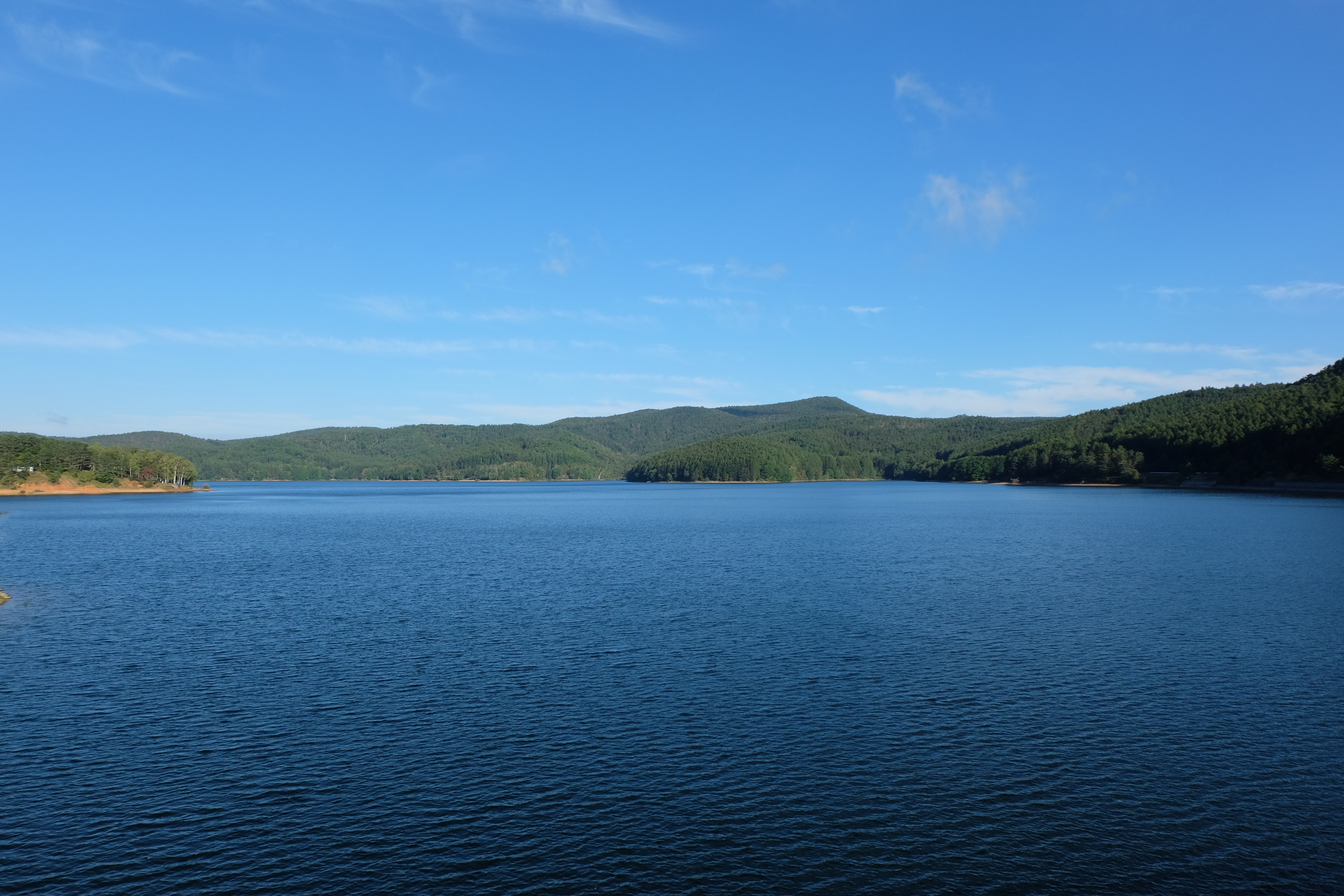 岩洞ダムから見た 岩洞湖